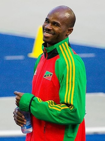 Kim Collins - ehemaliger 100m Weltmeister